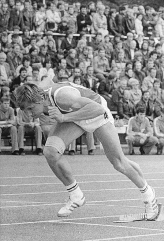 Frank Schaffer ADN-ZB Häßler 17-7-80 Cottbus: 31.DDR-Meisterschaften in der Leichtathletik- DDR-Meister im 400-m-Lauf der Männer wurde Frank Schaffer (ASK Potsdam) auf Bahn 4 mit 46,12s.